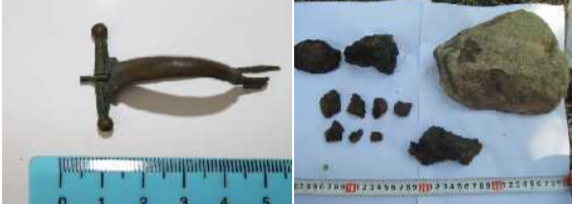 2012-2014 წლებში ჭუბერის თემის სოფ. ზედა მარღში აღმოჩენილი ბრინჯაოს ფაბულა, წიდები და რკინის შემცველი ქვები.